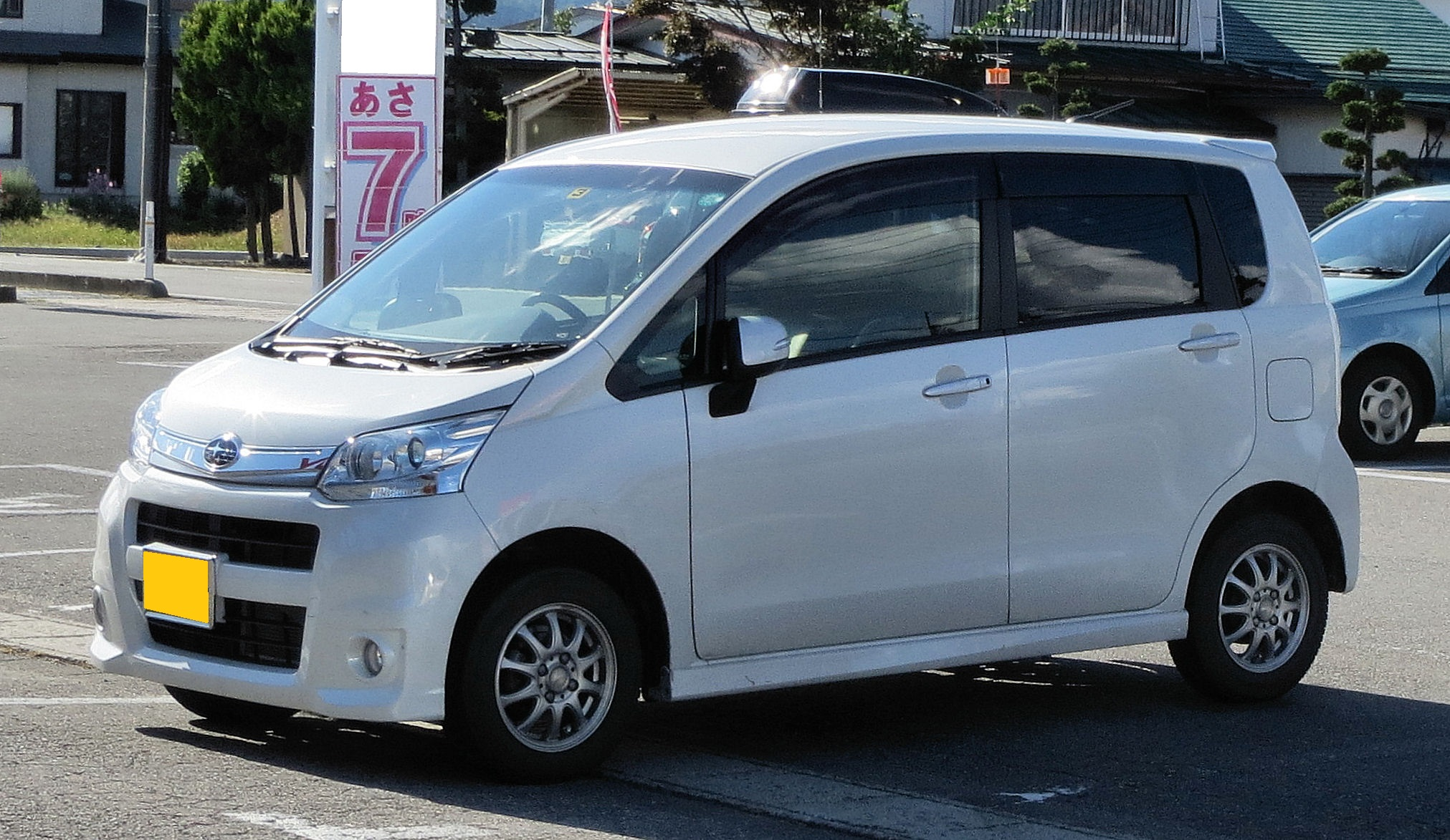 スバル ステラカスタムR